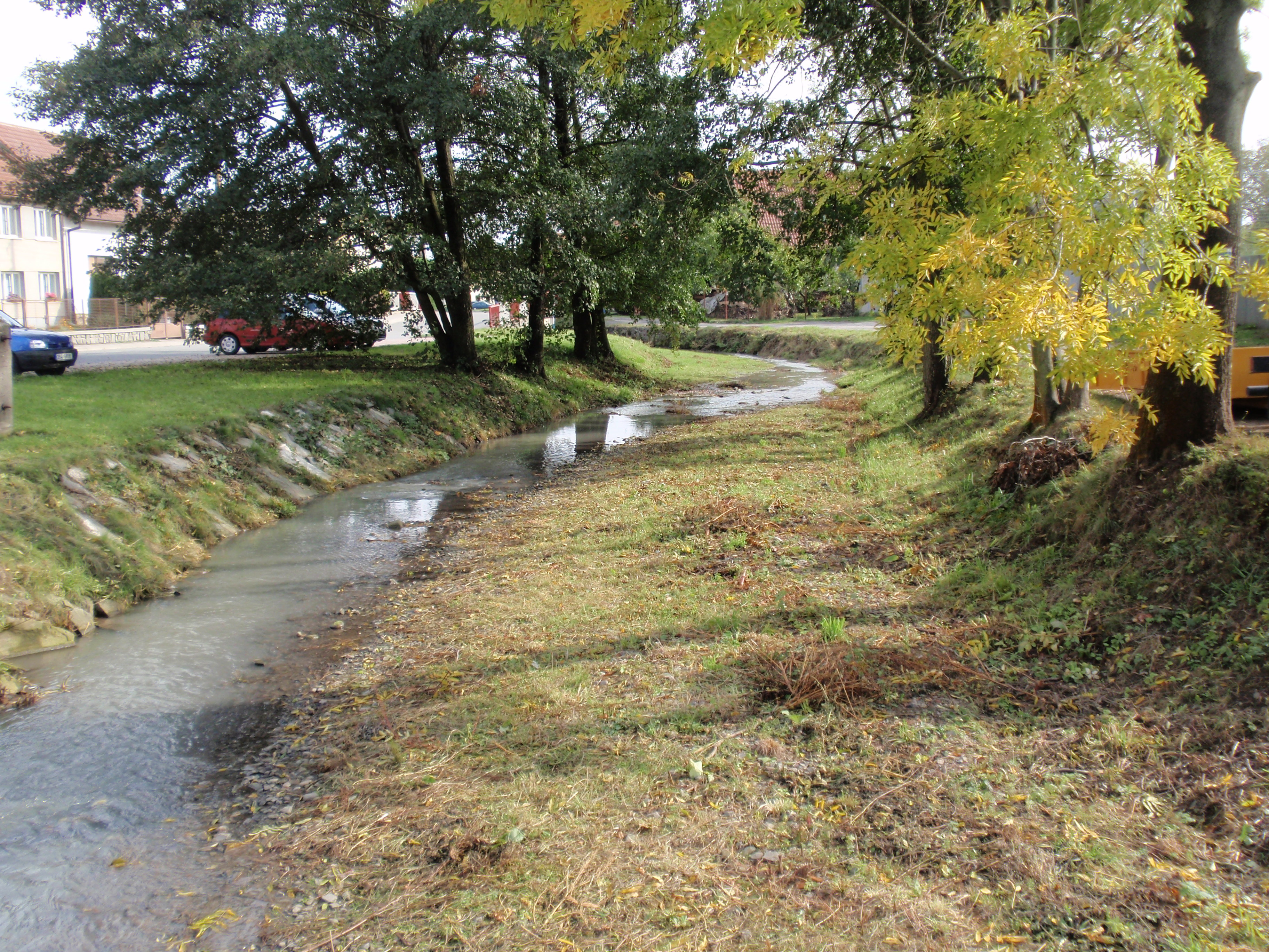 Dědice, Potoční, nad mostem přes Malou Hanou